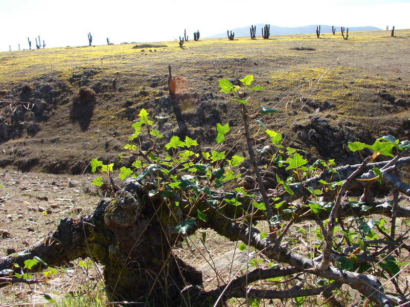 al fondo praderas invernales de Oxalis perdicaria (ex - mallobolba), otoño en el cerro Talinay, al sur de Huentelauquén, región de Coquimbo